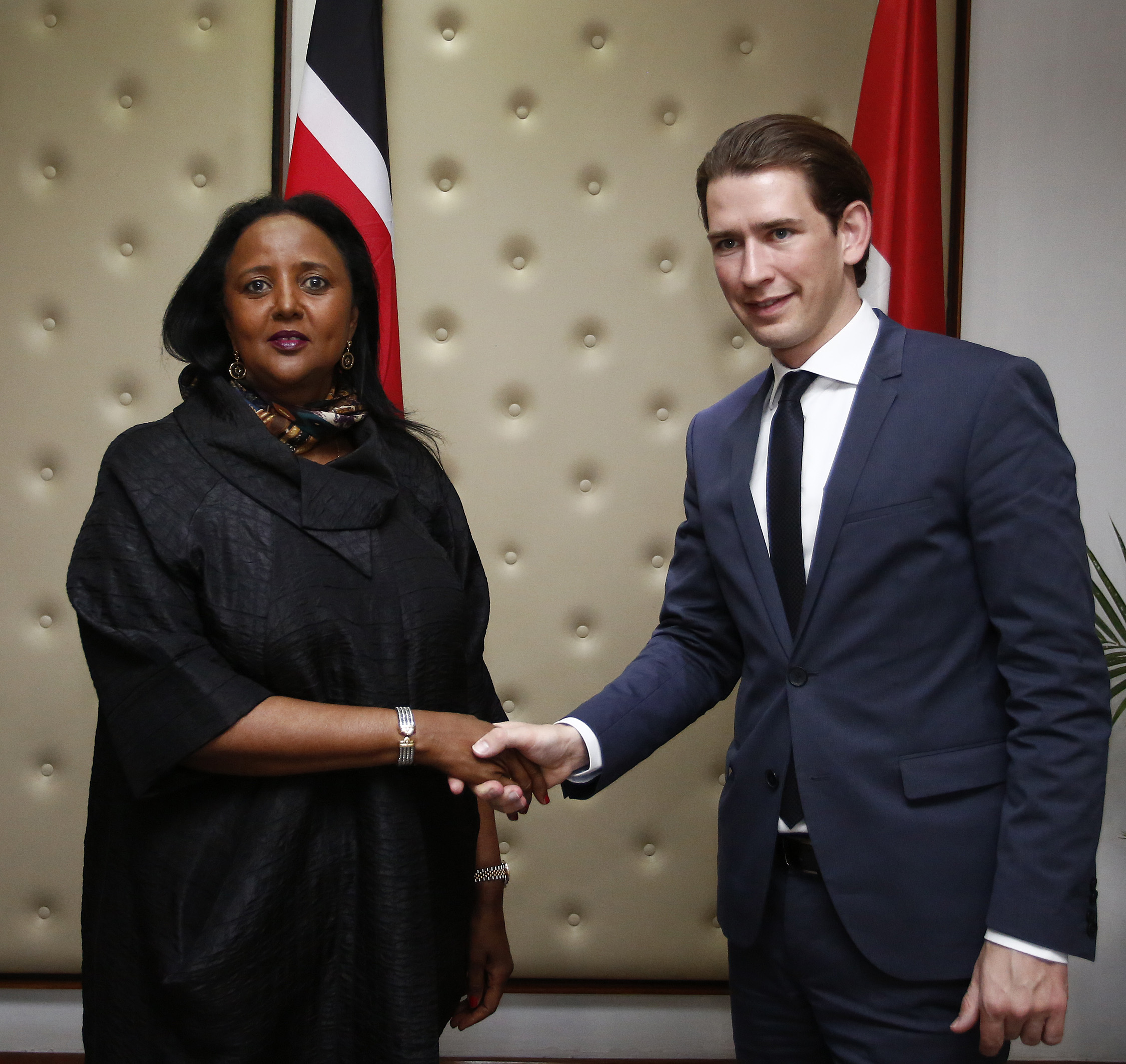 Arbeitsbesuch Kenia. Bundesminister Kurz trifft die kenianische Außenministerin Amina Mohamed. Nairobi. Kenia. 27.10.2016, Foto: Dragan Tatic